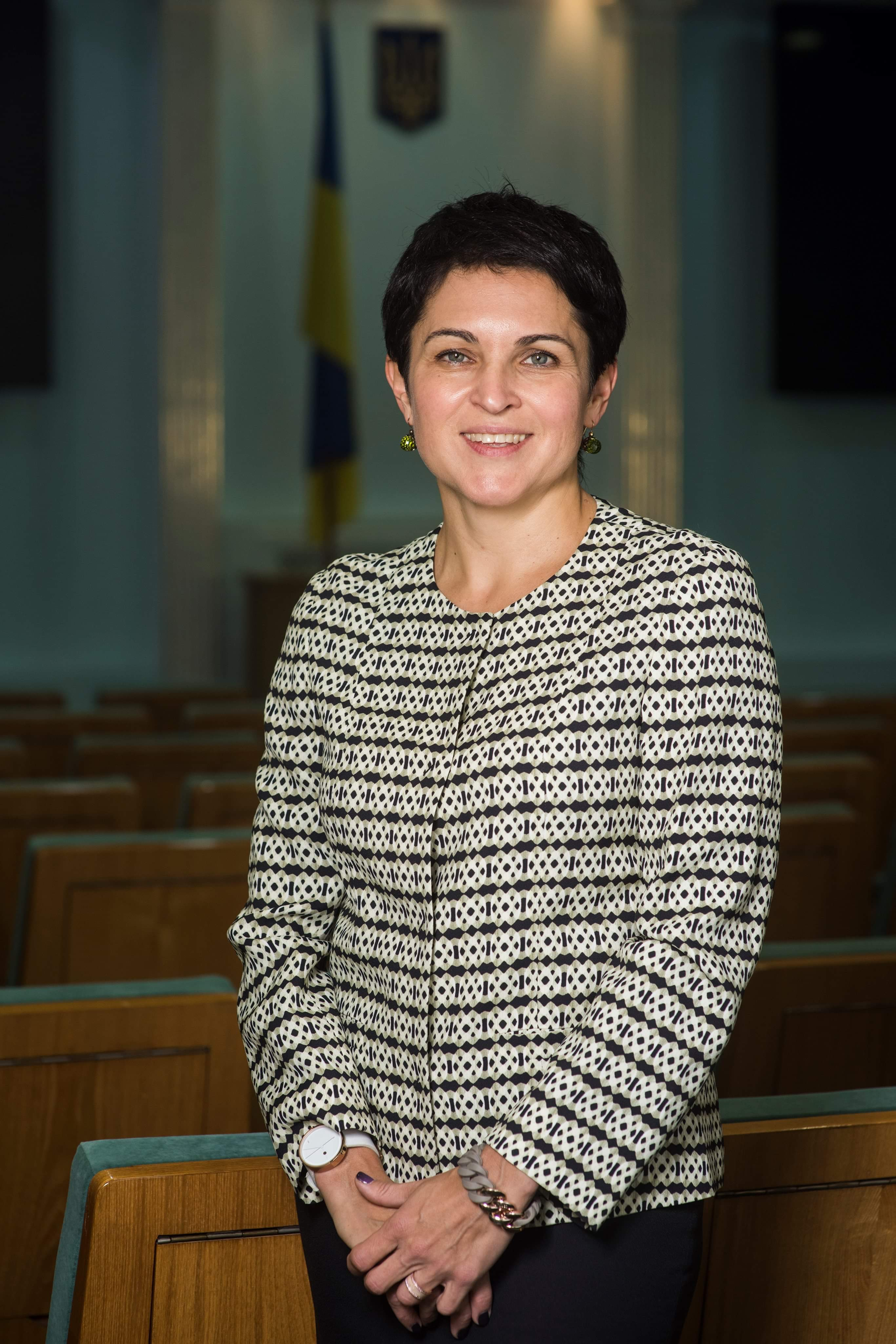 Сліпачук Тетяна Володимирівна (*25 травня 1968, Київ) — український правознавець, фахівець з міжнародного приватного права та міжнародного арбітражу, кандидат юридичних наук. Заслужений юрист України (2016). Голова Центральної виборчої комісії України.